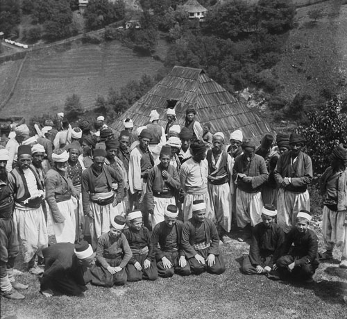 Bosna - madrasa